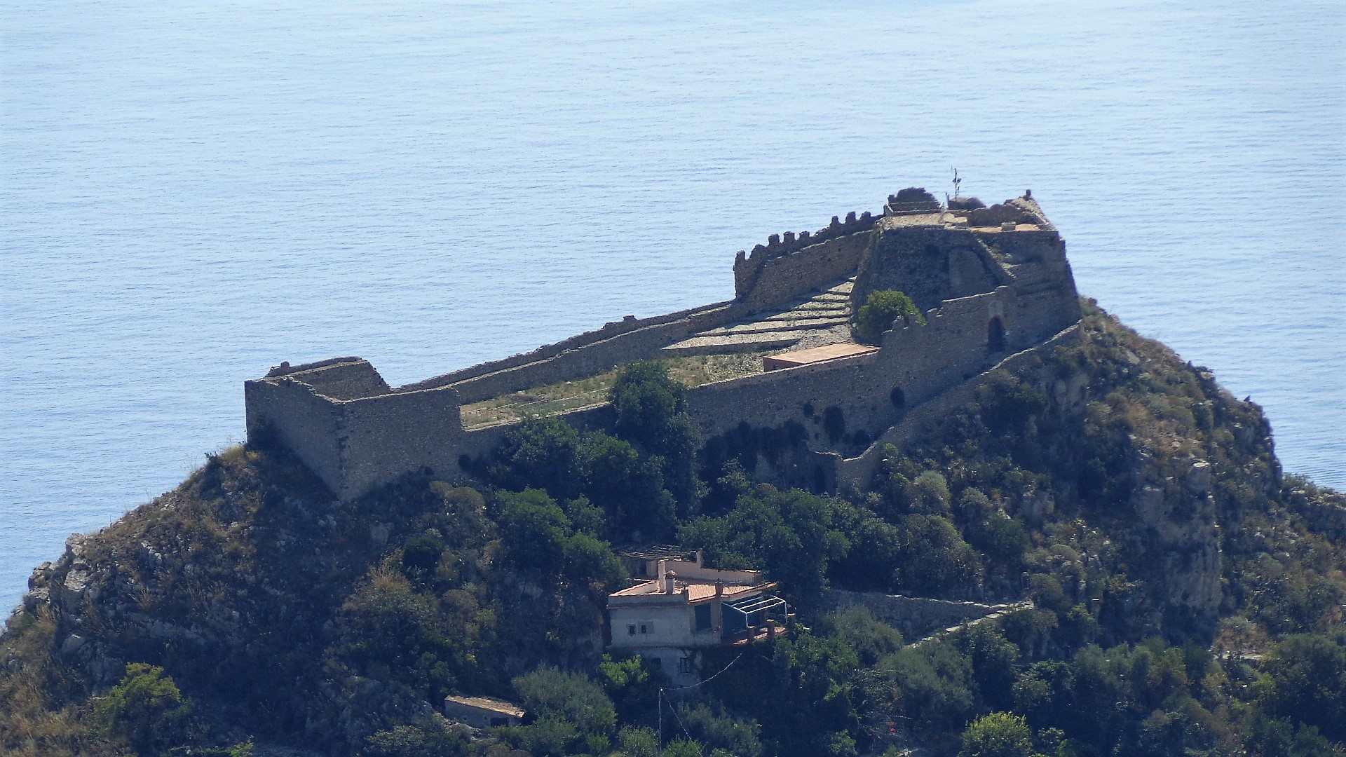 Panorama e dettaglio sul castello di Taormina.